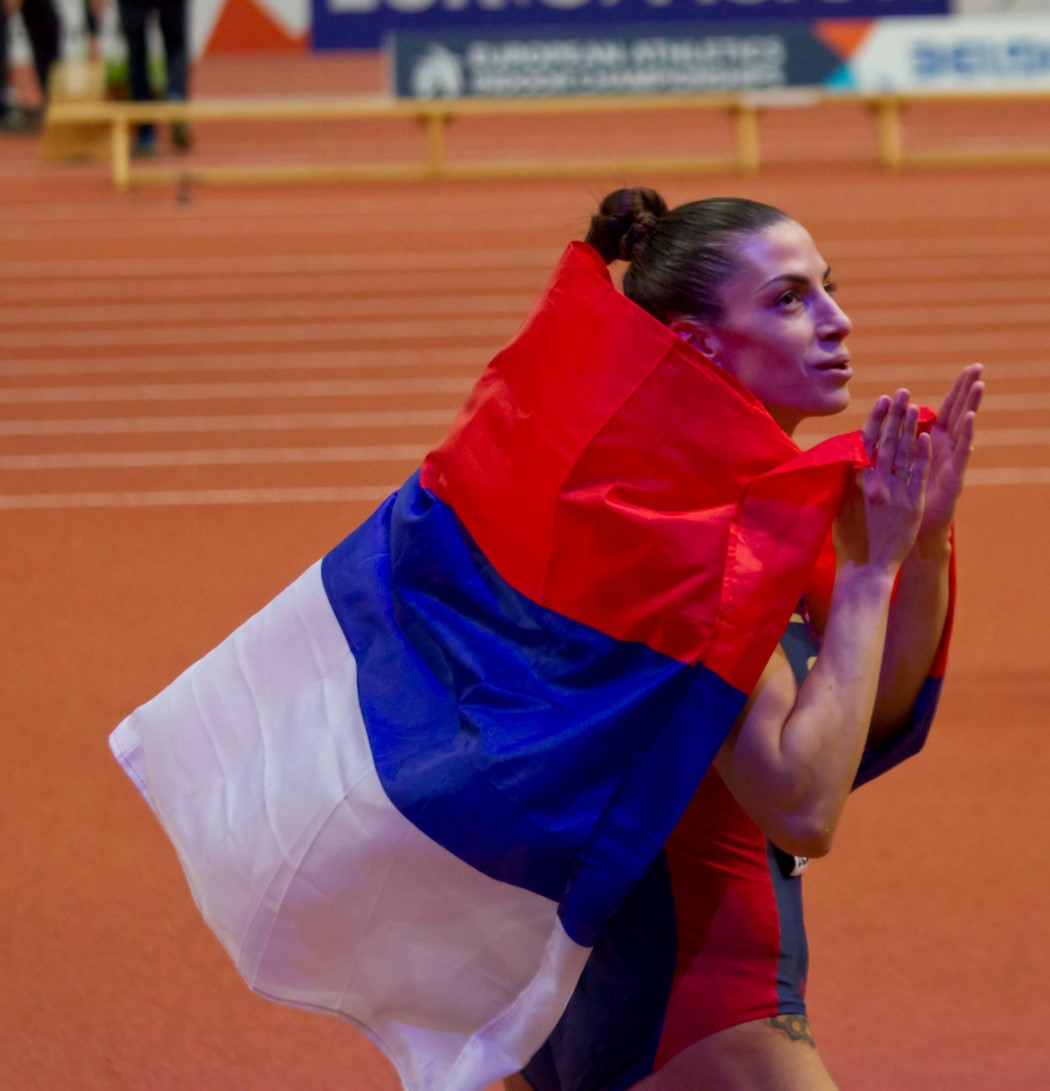 480 spanovic